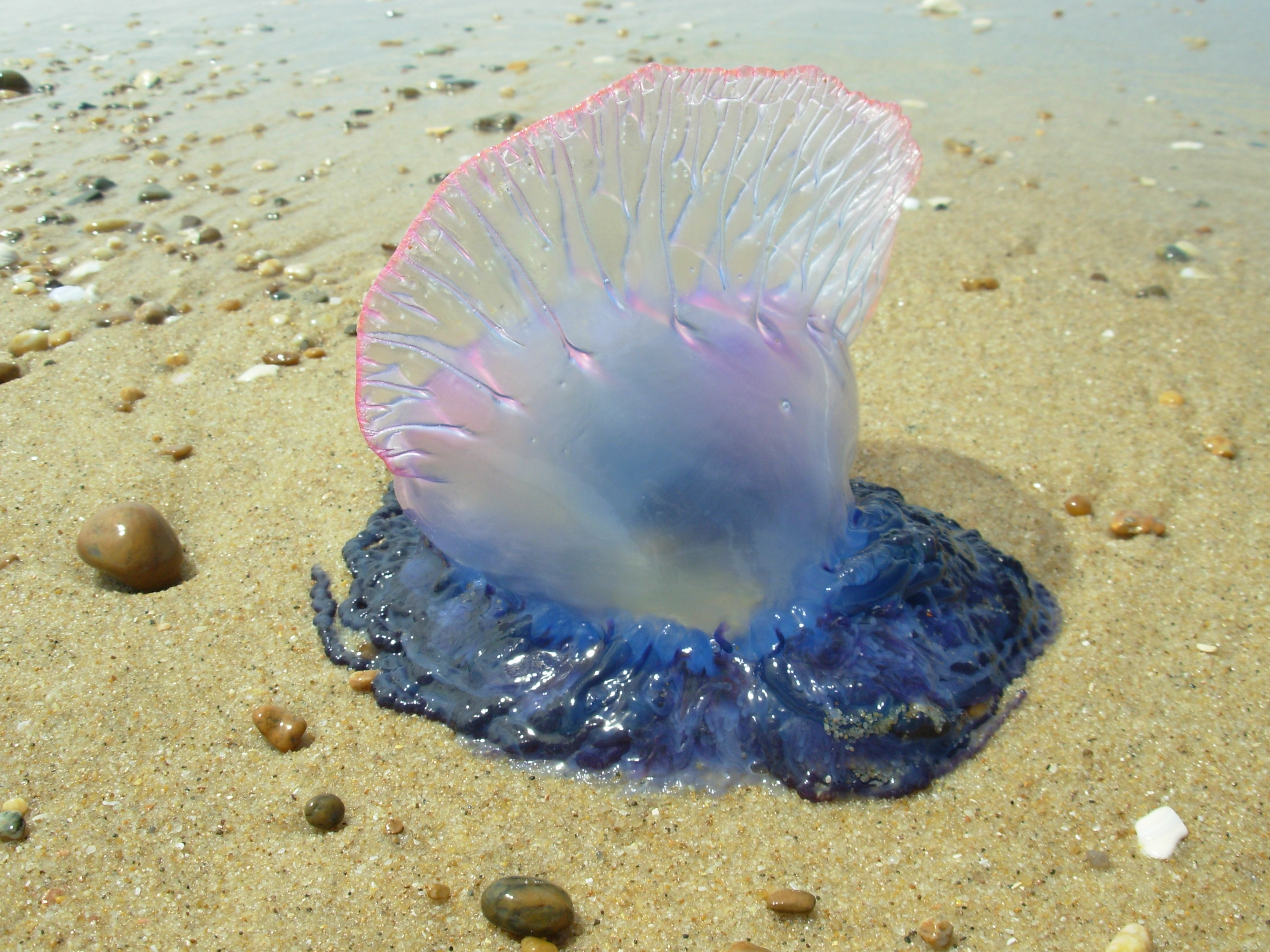 Portugiesische Galeere (Physalia physalia) am Strand von Moliets Plage (Frankreich)